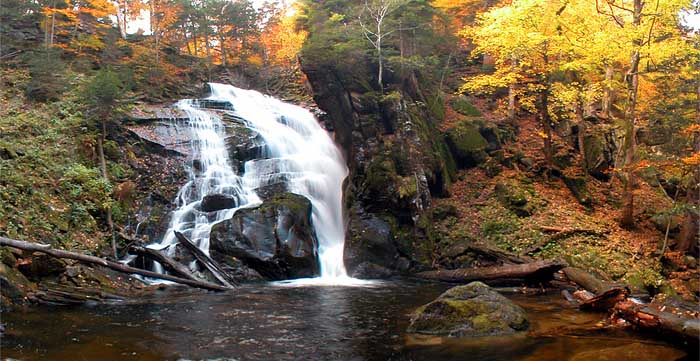 Slapo Šumik na reki Lobnici - Pohorje